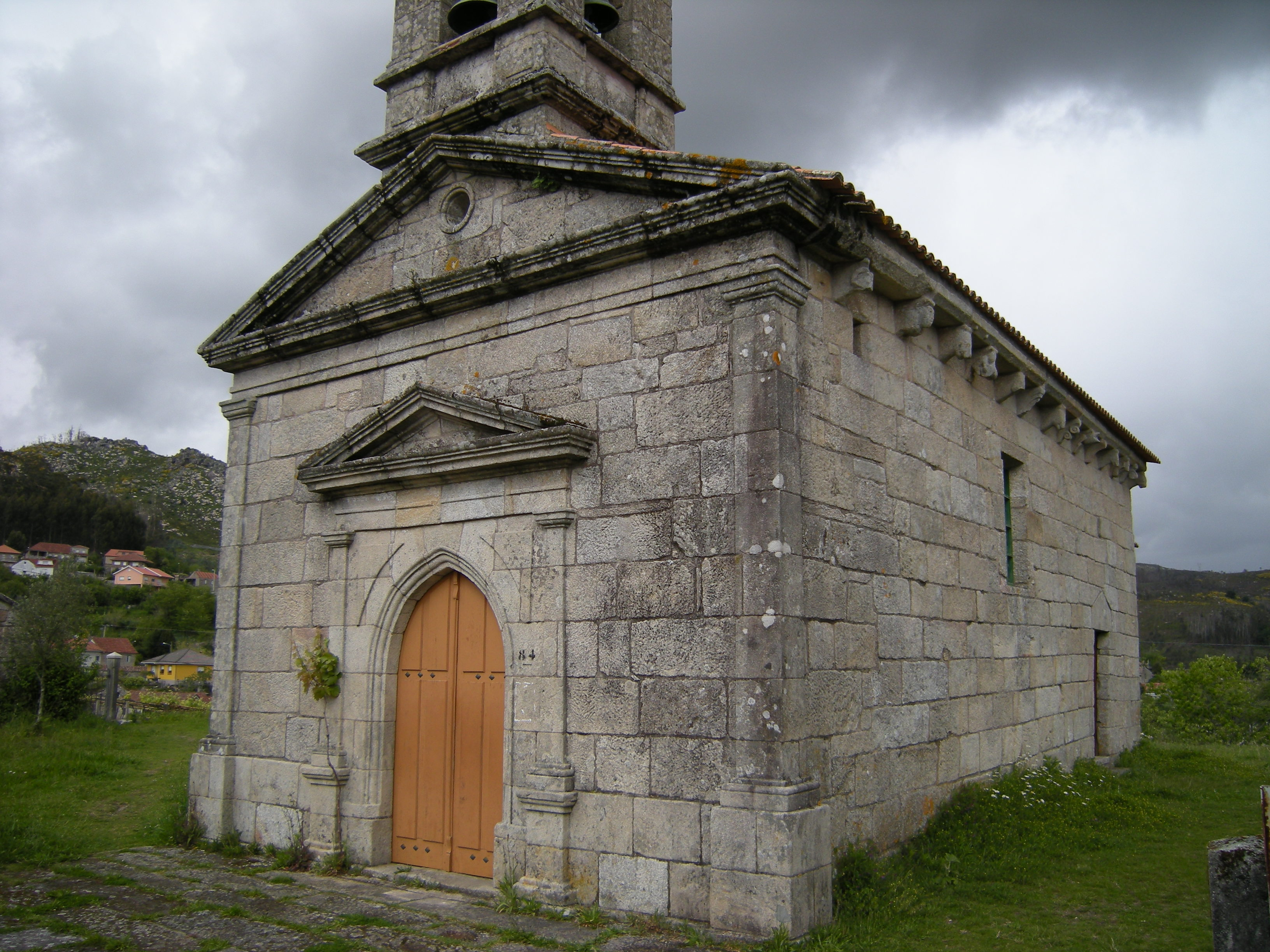 Igrexa de Santo Estevo da Canicouva, Pontevedra